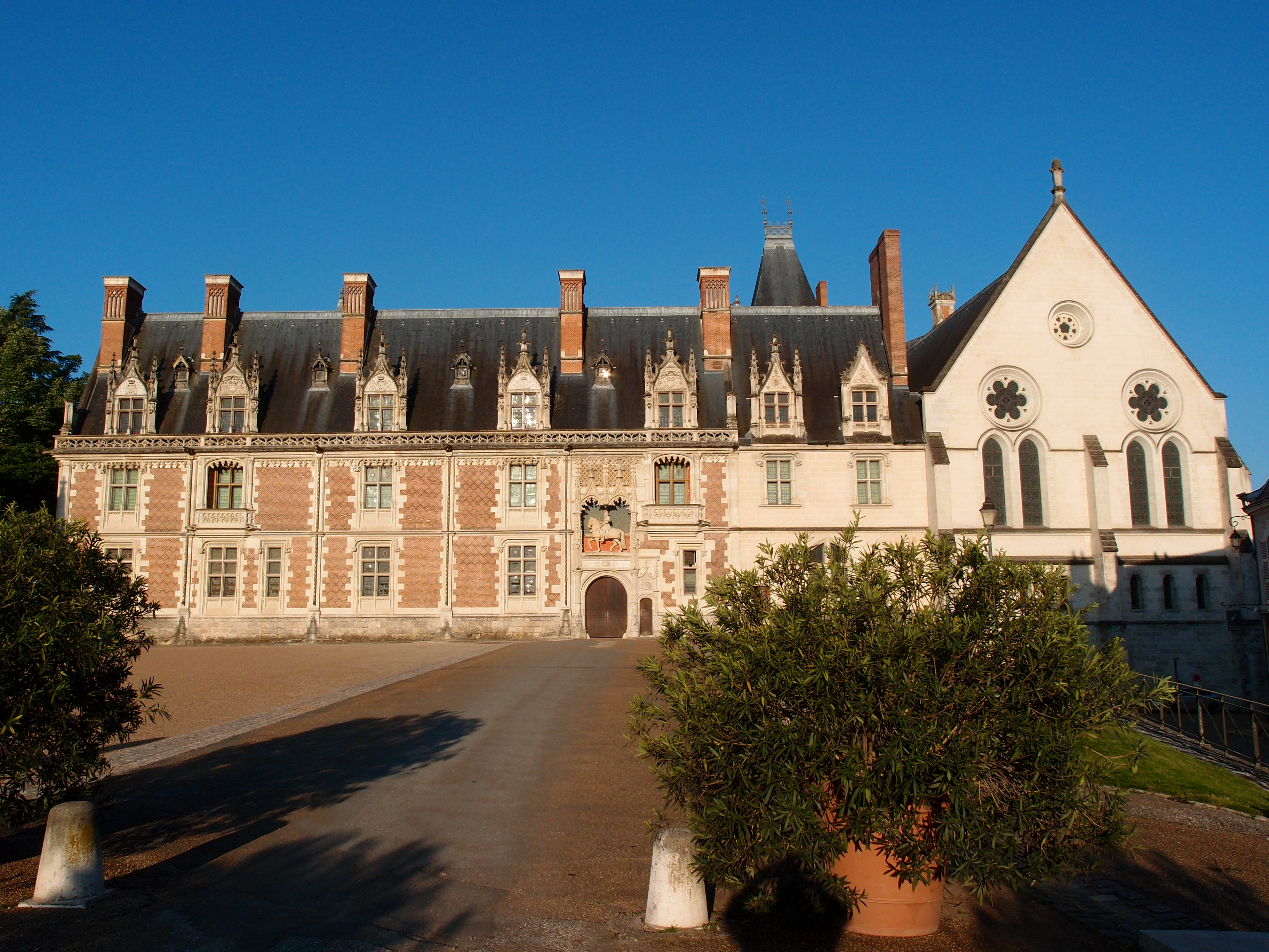 Teilansicht von Schloss Blois (Flügel König Ludwigs XII.) Datum: 17.05.2014 Urheber: M. Pfeiffer alias Gordito1869 Quelle: Privates Fotoarchiv des Urhebers